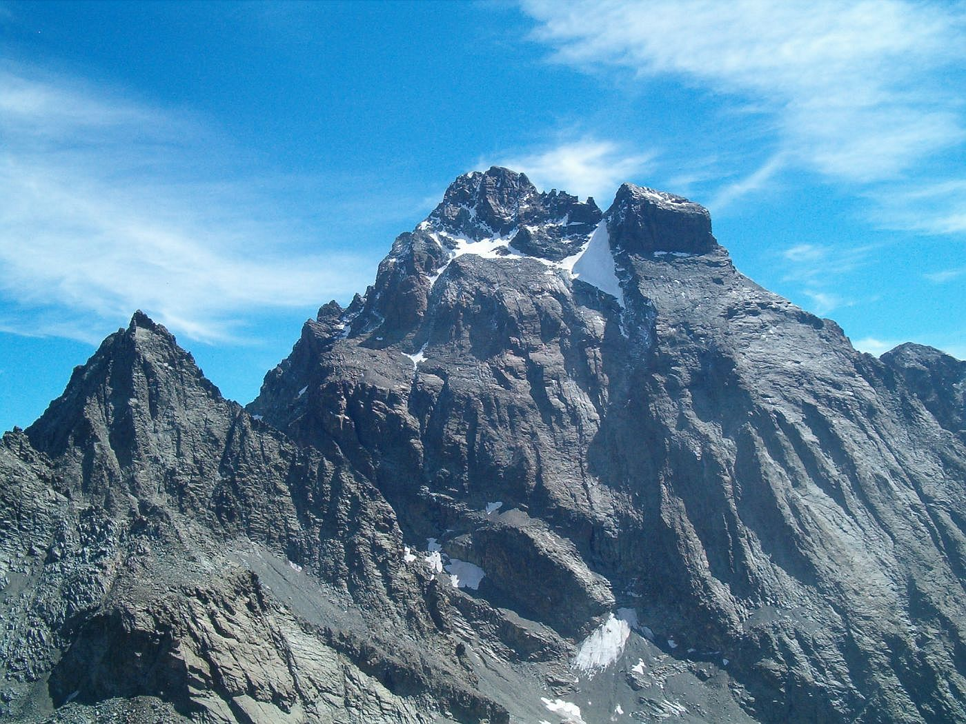 Il gruppo del Monviso visto dal Monte Losetta (nord-ovest): Visolotto (la punta triangolare più bassa), Monviso (la punta più elevata), Viso di Vallanta (il "cubo" più sulla destra)